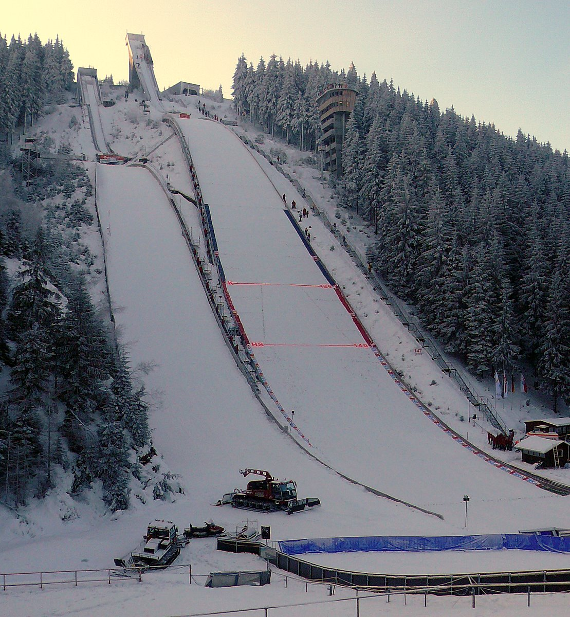 Schanzenanlage im Kanzlersgrund